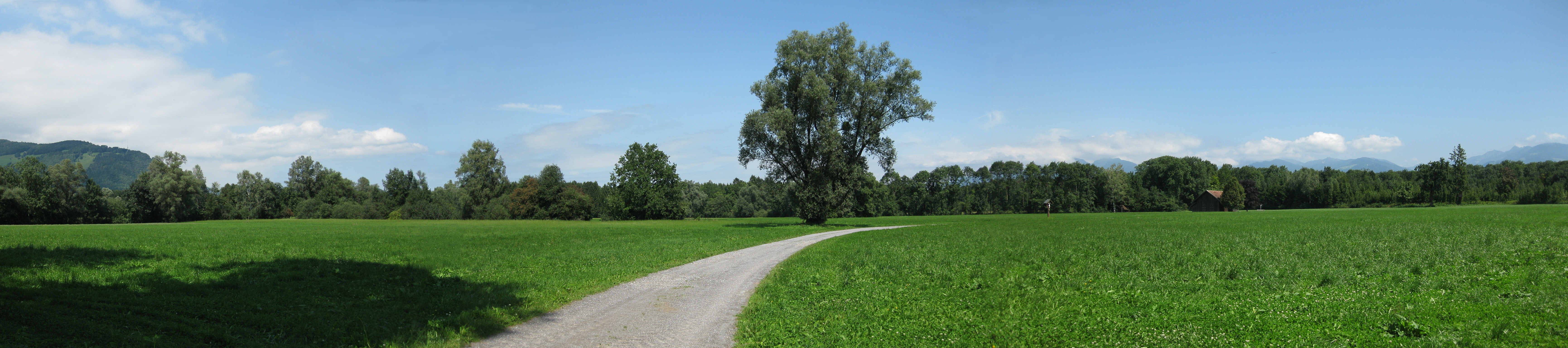 Matschels (Obermatschels), "Schatzmann's Ställe"